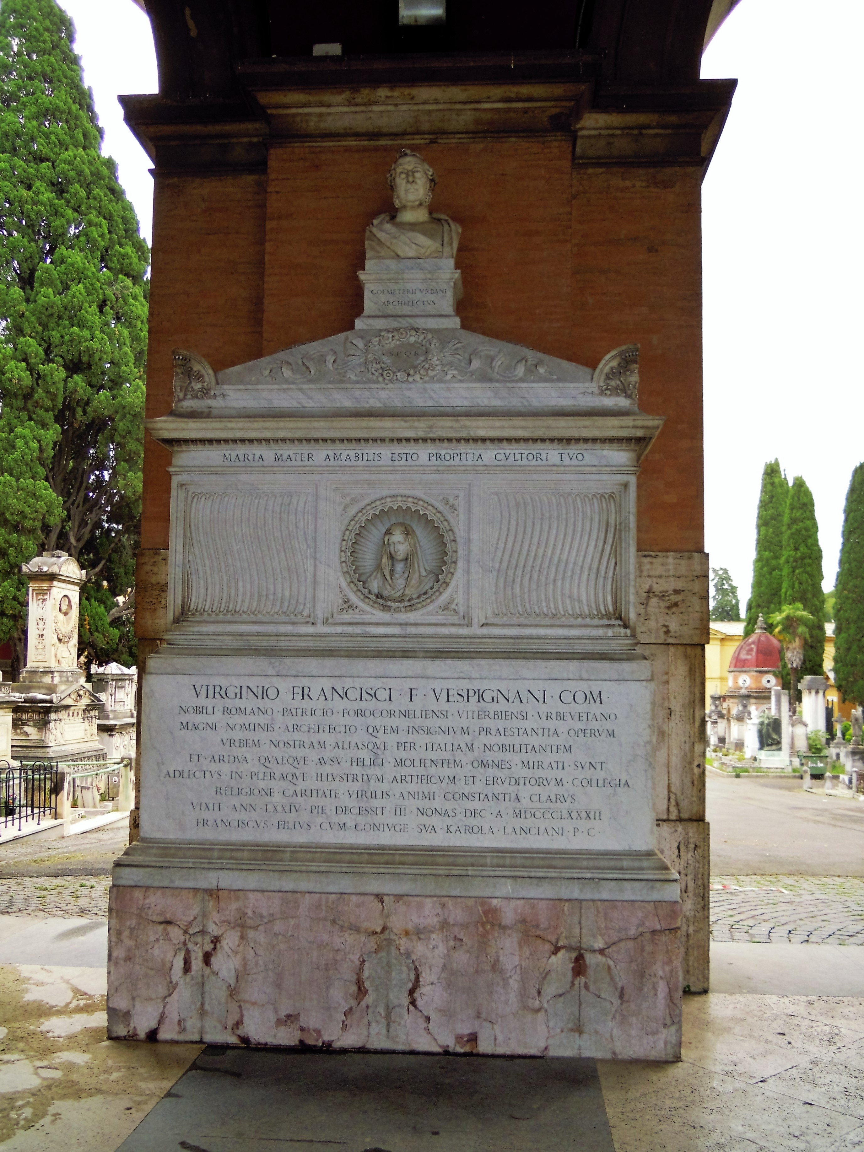 Roma, cimitero del Verano: monumento sepolcrale di Virgino Vespignani (1808-1882)